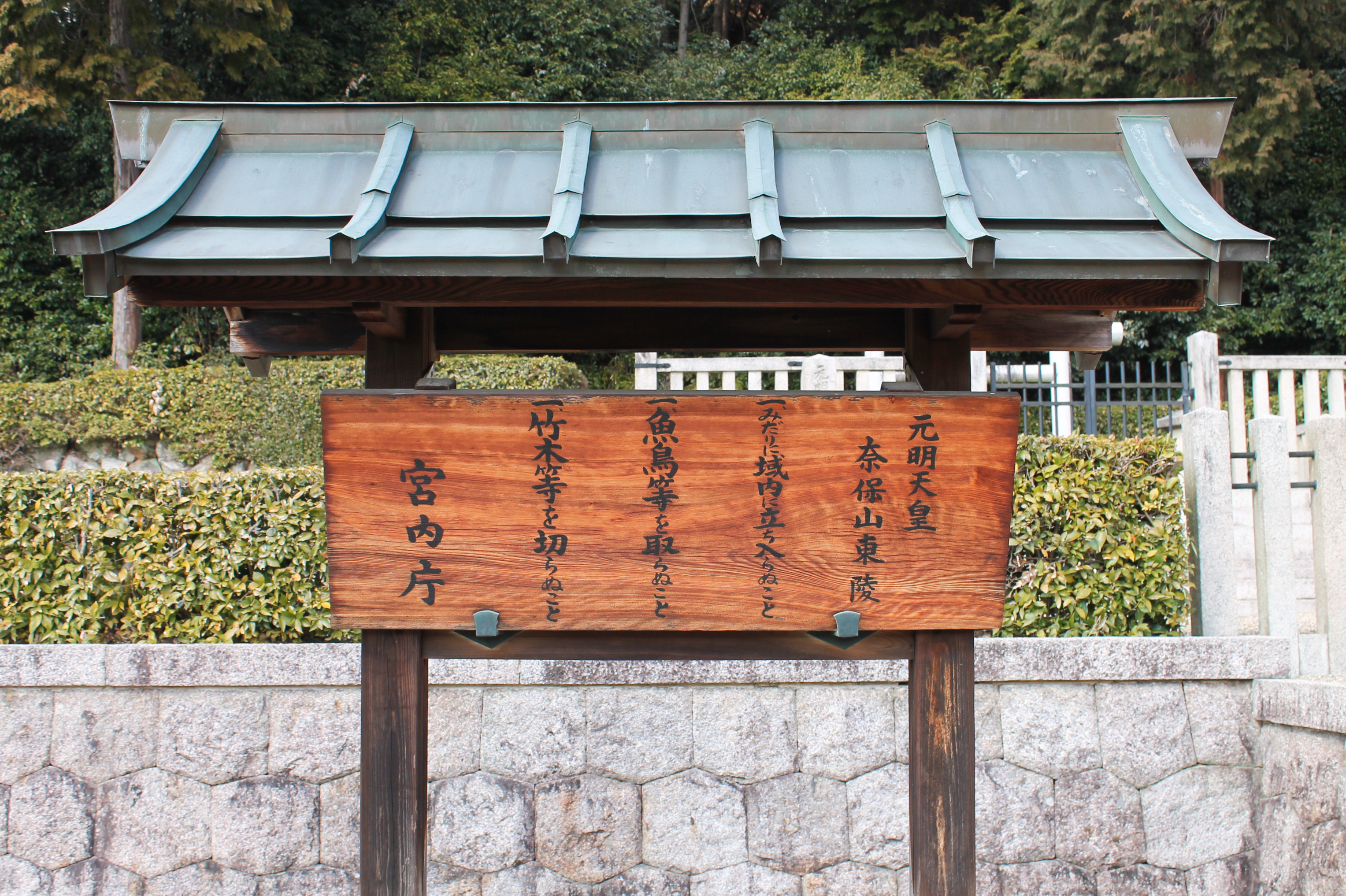 元明天皇陵に治定されている奈保山東陵前にある立札。参拝者等に対する注意書きが書かれている。